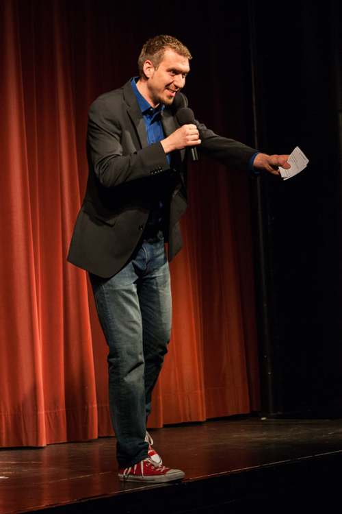 beschreibung